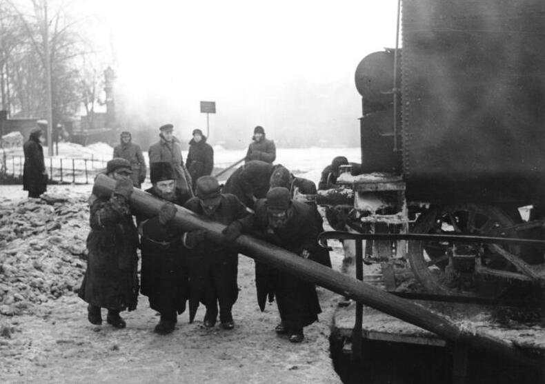 ADN-ZB/Donath II. Weltkrieg 1939 - 1945 Sowjetunion (Beloruss. SSR) In den von den faschistischen deutschen Truppen besetzten Gebieten. Minsk: Zur Zwangsarbeit verpflichtete Juden an der Drehscheibe des Eisenbahnbetriebswerkes. Aufn. Februar 1942 Information added by Wikimedia users.